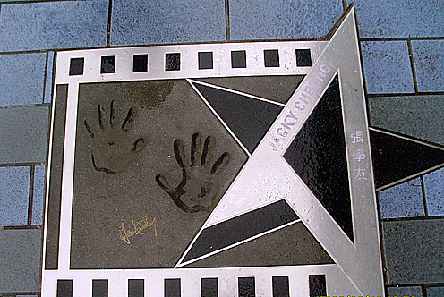 張學友的手印